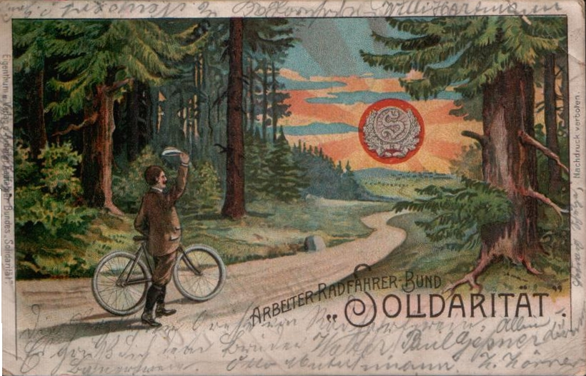 Postkarte des Arbeiter Radfahrer-Bund Solidarität (ARB) aus dem Jahre 1906. Postkarte in Privatbesitz Norbert Luffy, D-52223 Stolberg. Scan erstellt durch Norbert Luffy